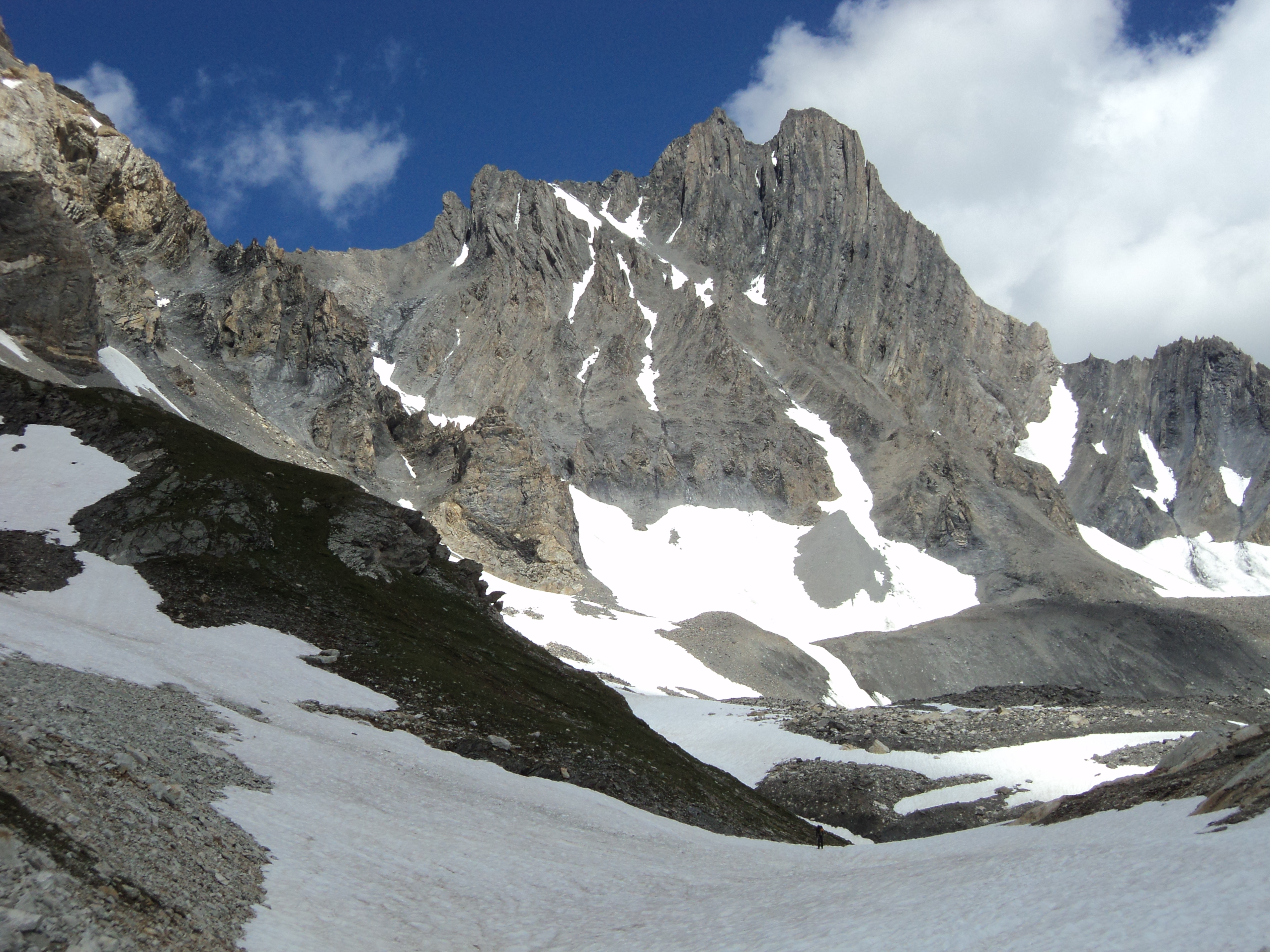 La montagna vista dal vallone de la Fournache